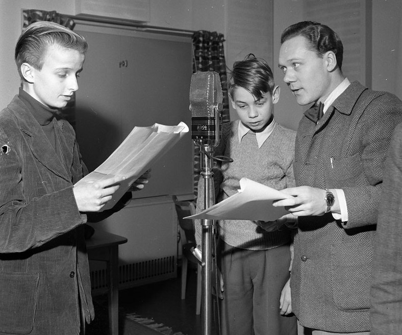 Radiotjänst. Radioinspelning av Mästerdetektiven Blomkvist. T. h. Skådespelaren Olof Thunberg